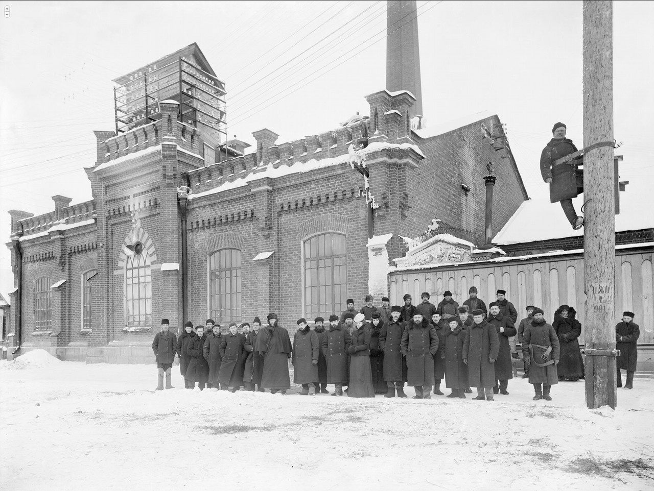 Первая электростанция Екатеринбурга